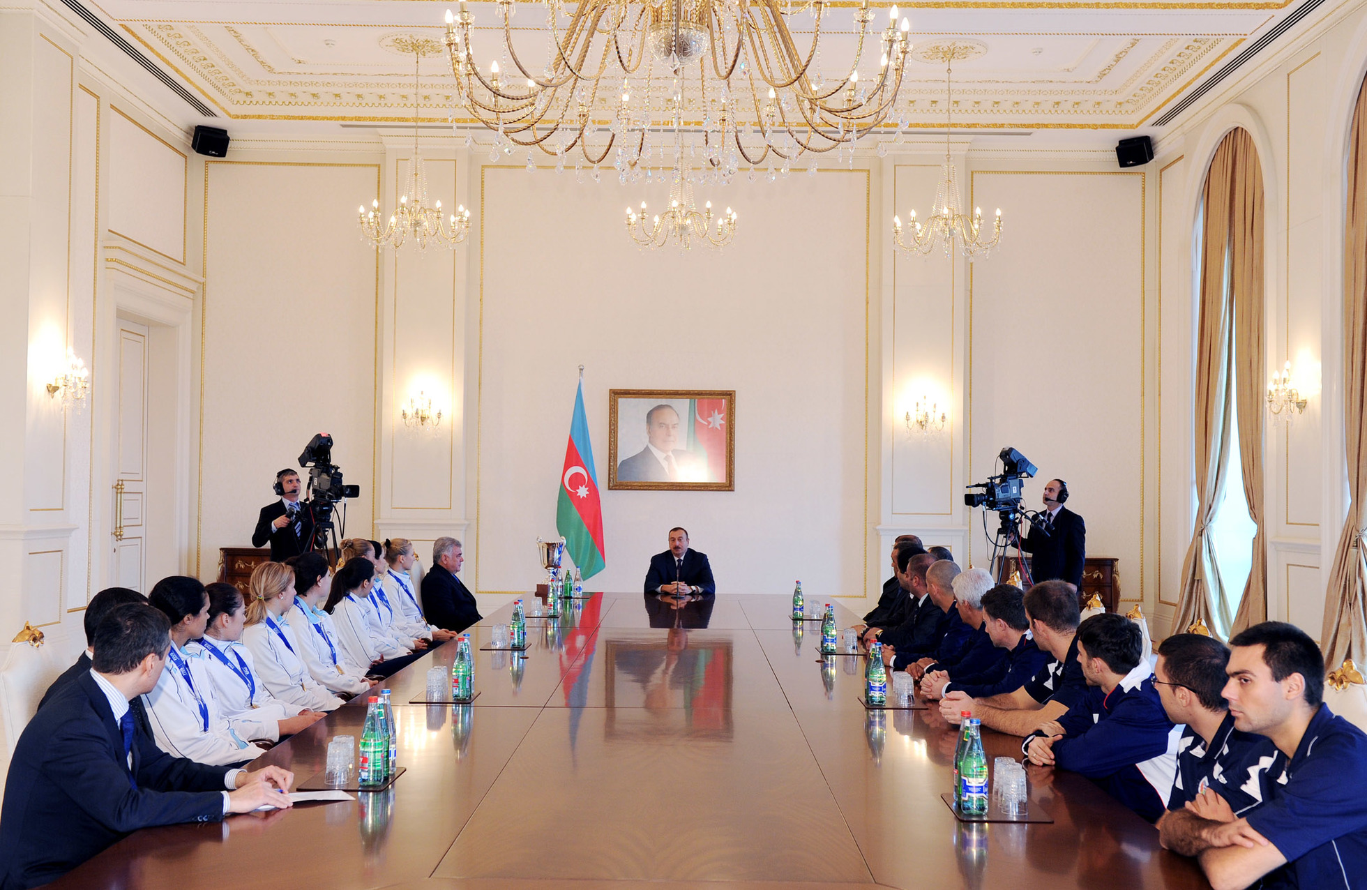 İlham Əliyevin “Rabitə” voleybol klubunun üzvlərini qəbul etməsi